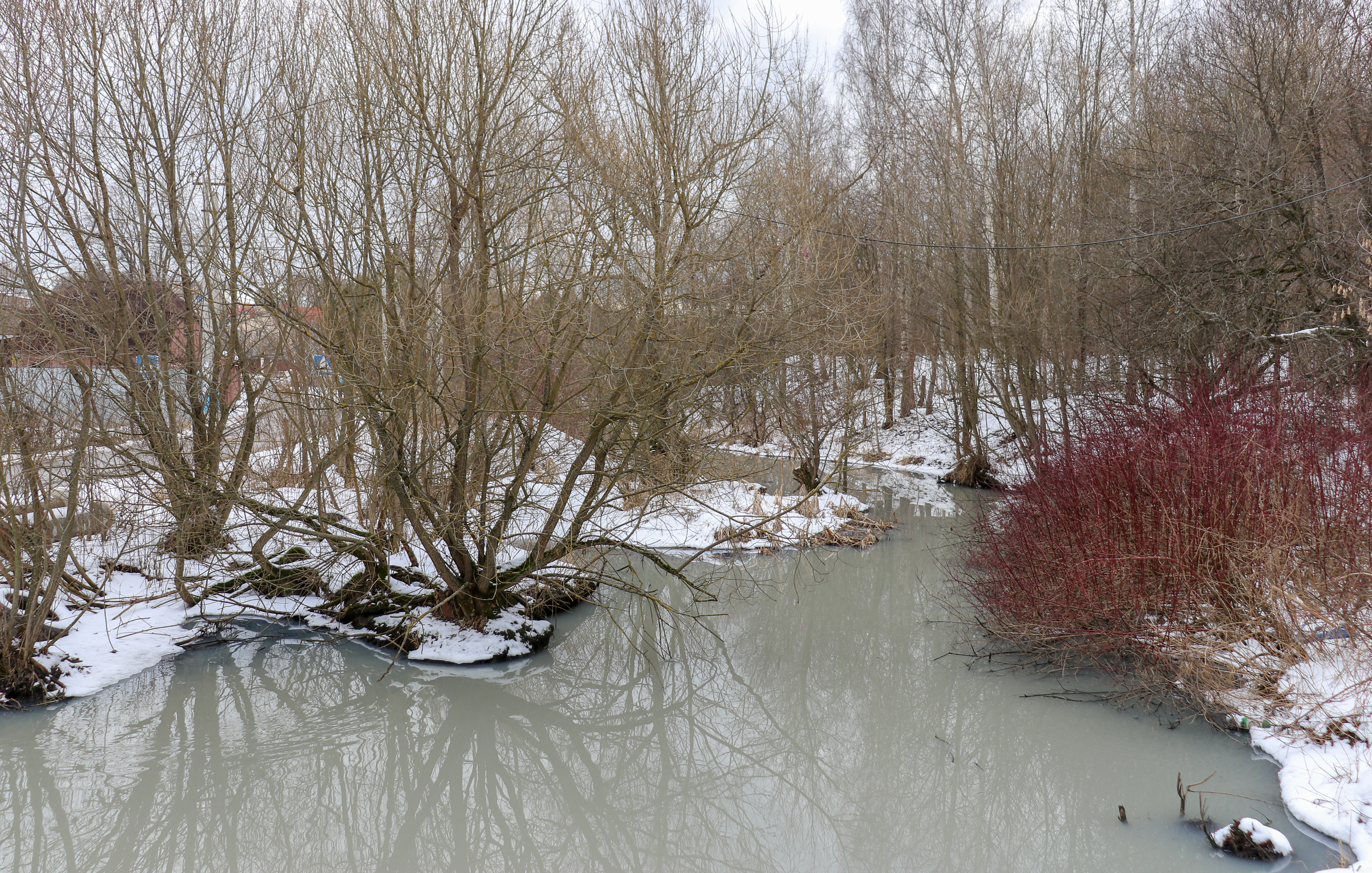 Река Ликова в Валуевском лесопарке зимой